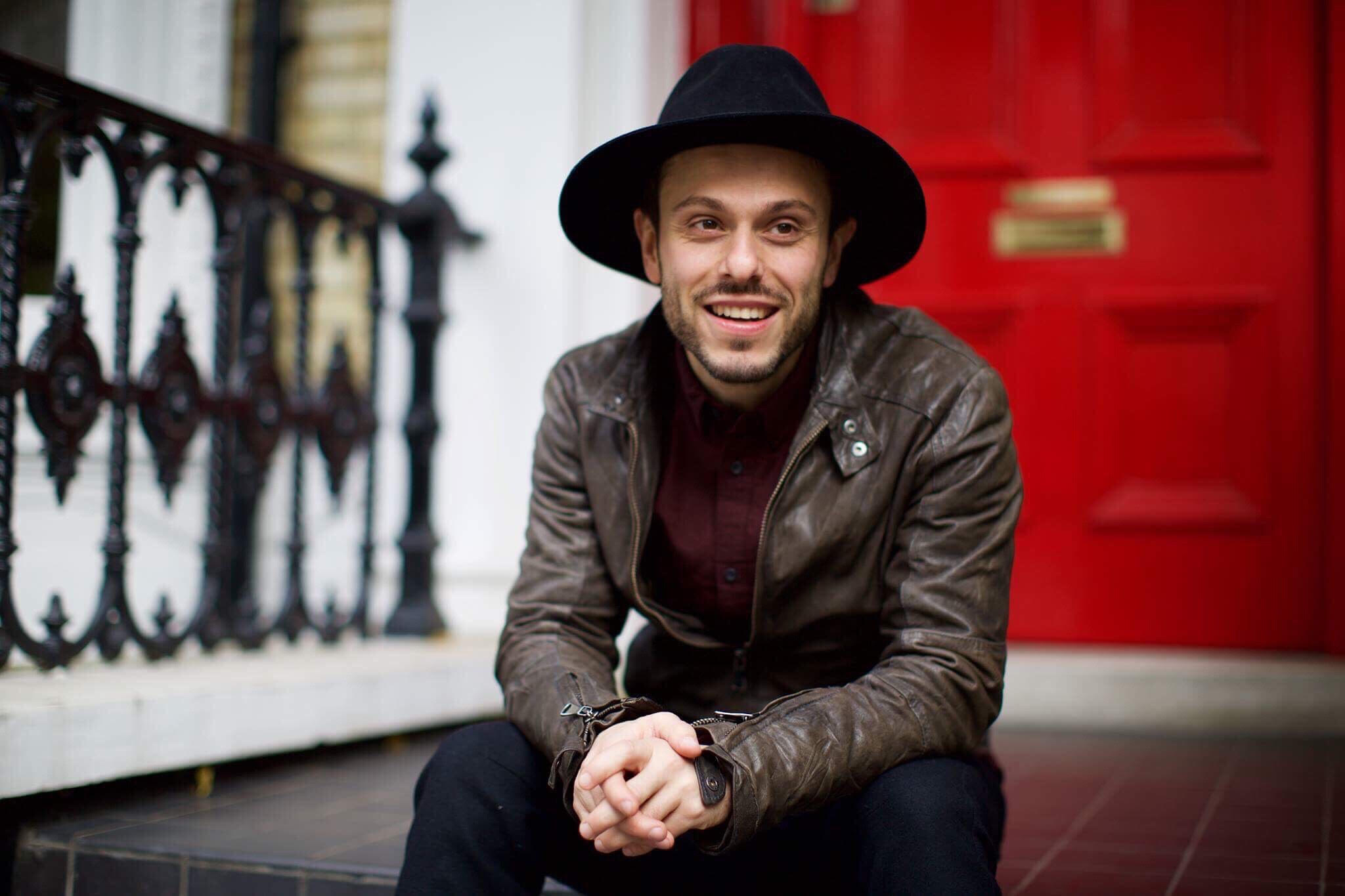 Sunsay frontman Andriy Zaporozhets